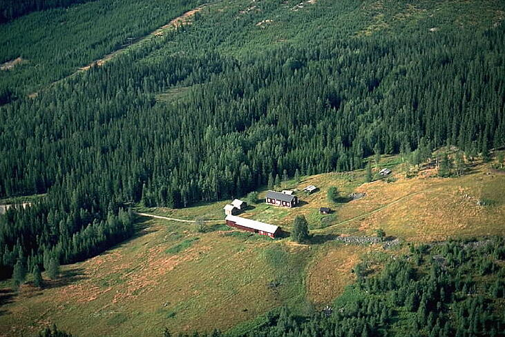 Motiv: Juhola Nyckelord: Byggnadsminnen, Flygbilder, Kulturreservat, Riksintressen Kategori: Finnbygd Juhola